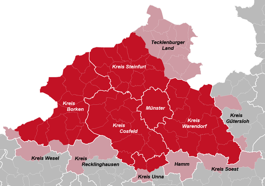 Karte von Nordrhein-Westfalen mit dem Münsterland.